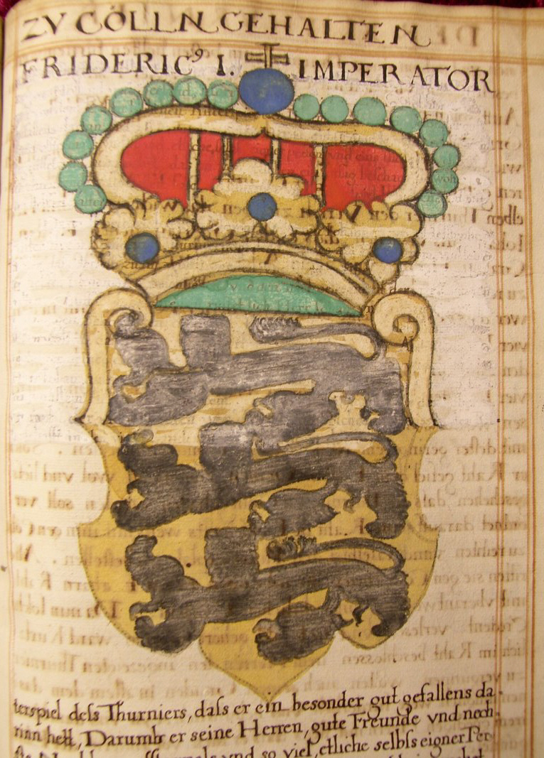 Um Zusätze vermehrte Abschrift von Sigmund Feyerabends Frankfurter Ausgabe (1578/1579) des Turnierbuchs von Georg Rüxner (Jörg Rugen), Handschrift auf Papier in zwei Bänden, 17. Jahrhundert. Detail